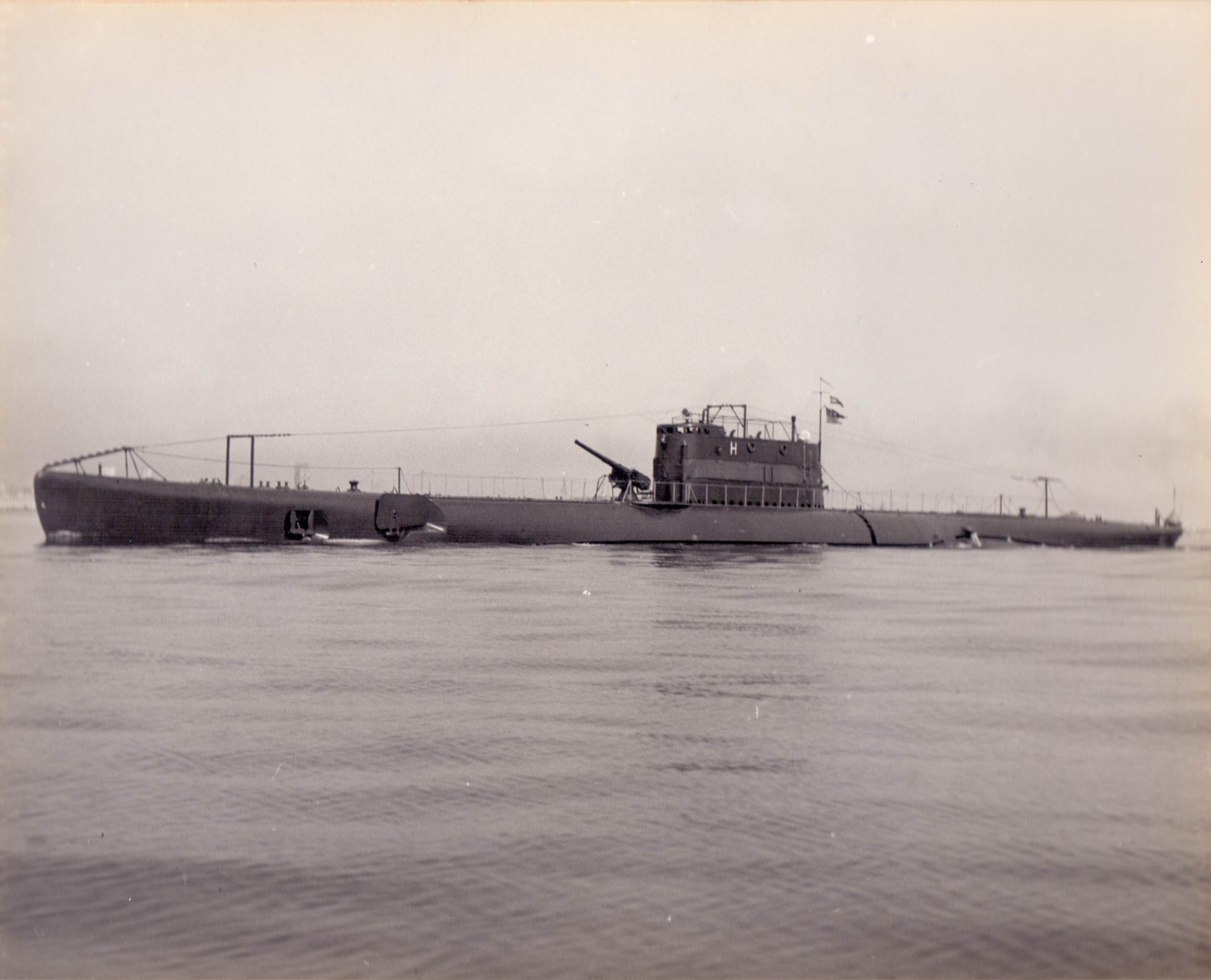 Arquivo liberado pela Marinha do Brasil através de projeto GLAM com Wiki Educação Brasil